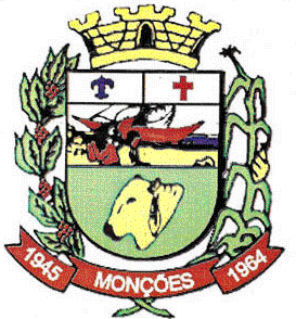 Brasão_do_Município_de_Monções